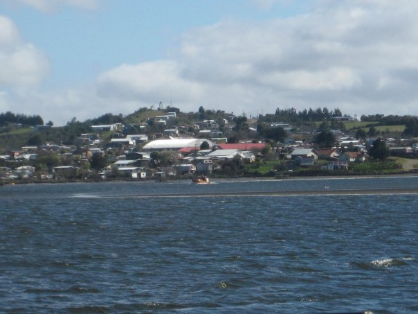 Vista panorámica de Quenuir Alto